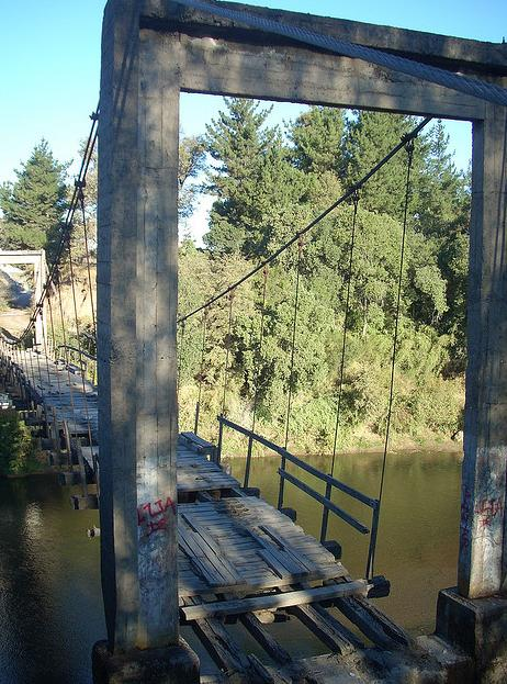 xD